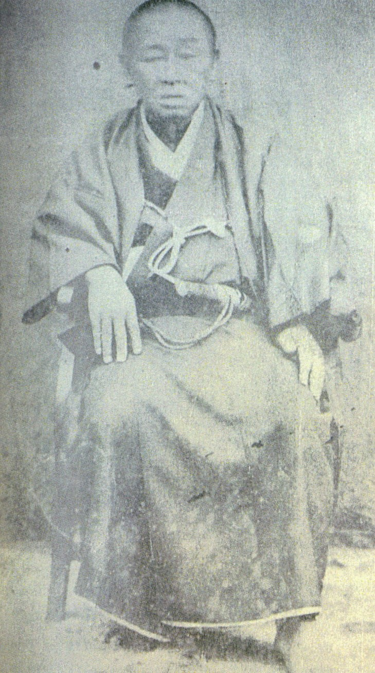 紀州田丸城代家老久野家8代当主・久野純固の肖像画。